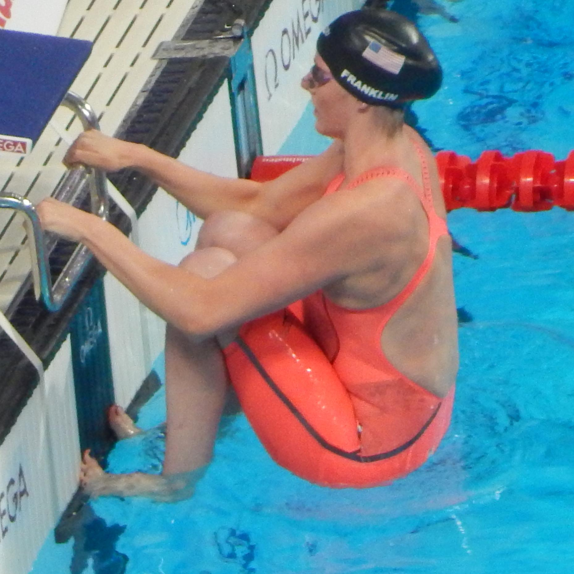 Мисси Франклин на чемпионате мира 2015 в Казани